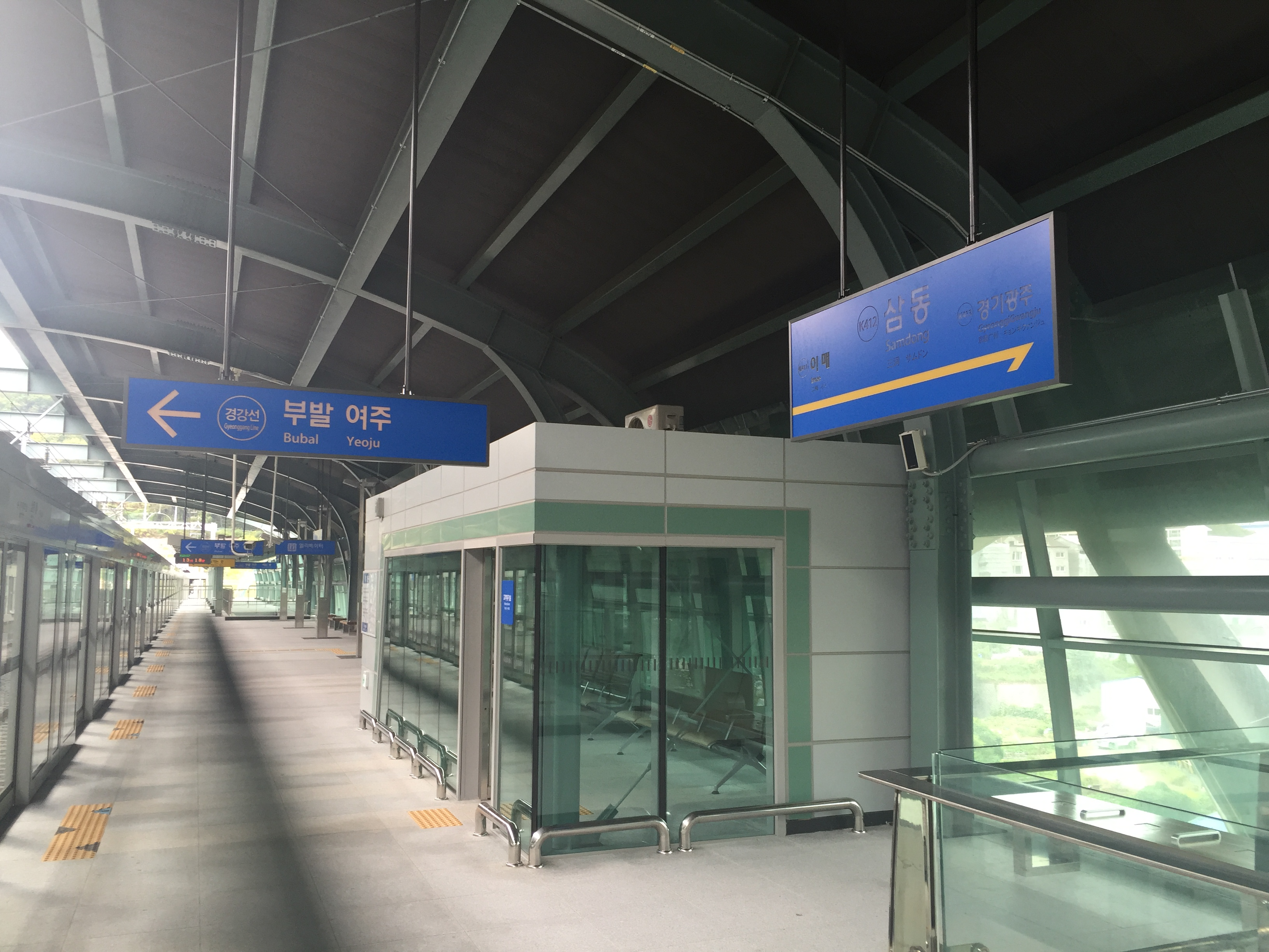 삼동역 승강장 입니다.